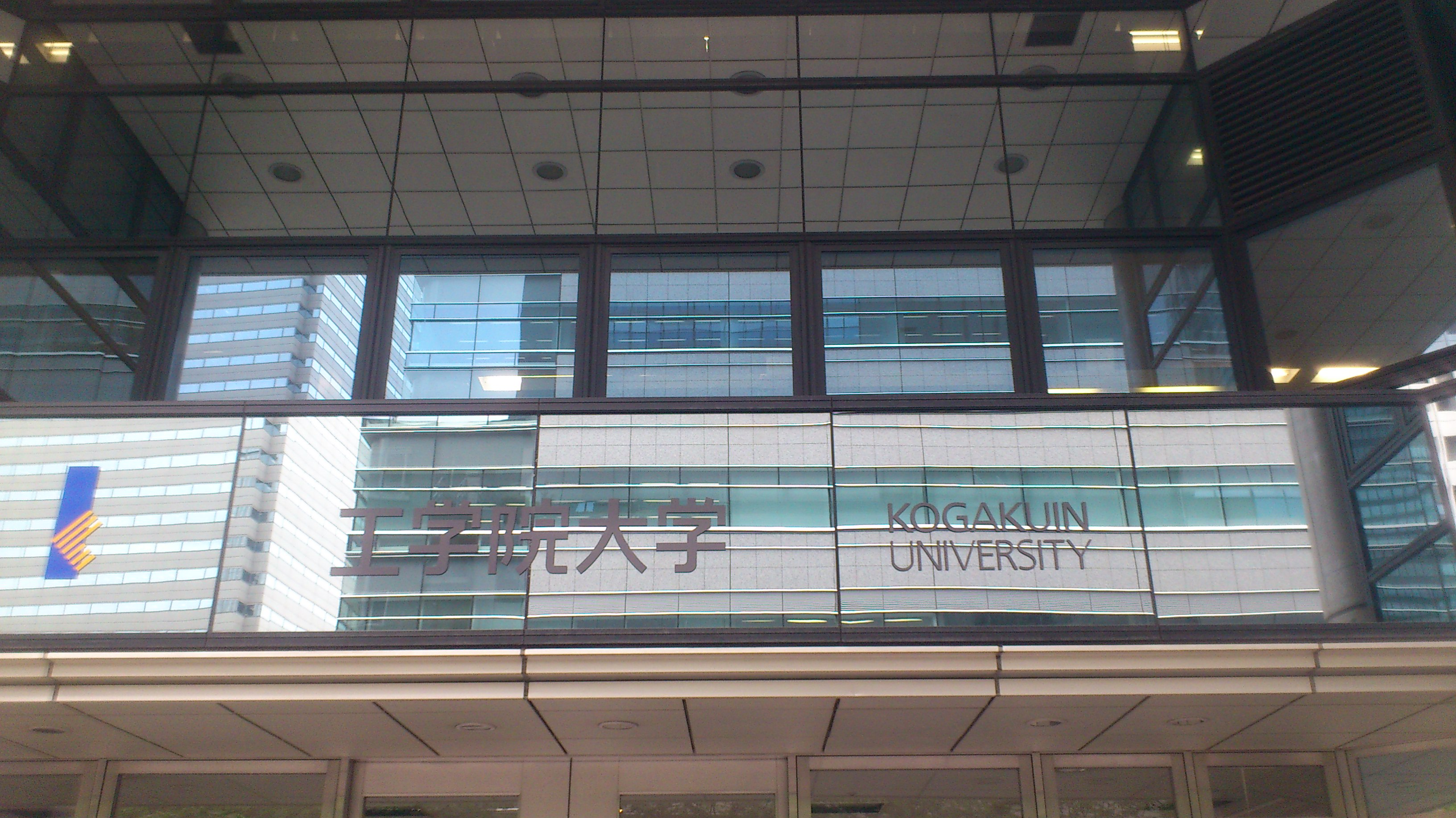 Entrée de Kogakuin University (Shinjuku)